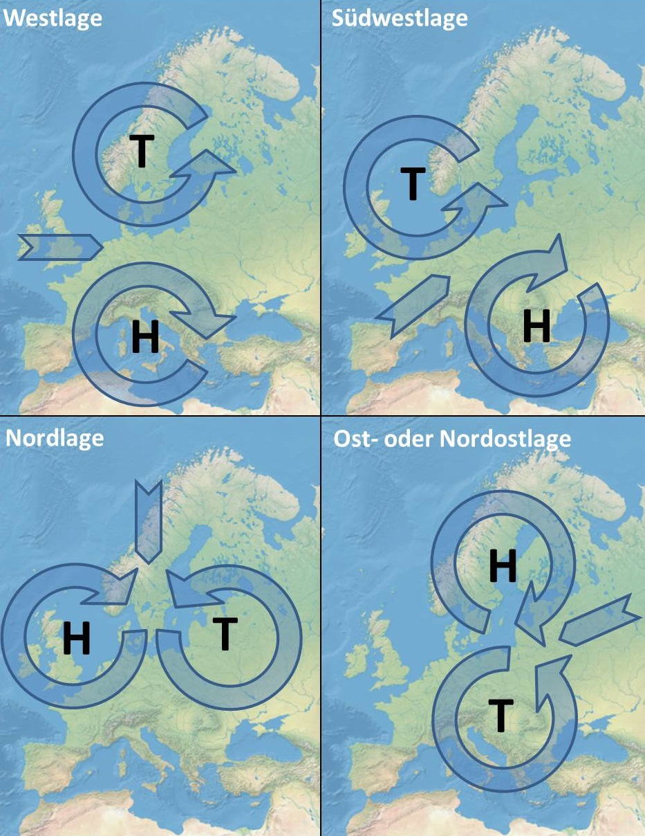 Typische Wetterlagen im Winter. Grundlage zur Erstellung bilden Karten auf Die Hintergrundkarten wurden auf generiert.